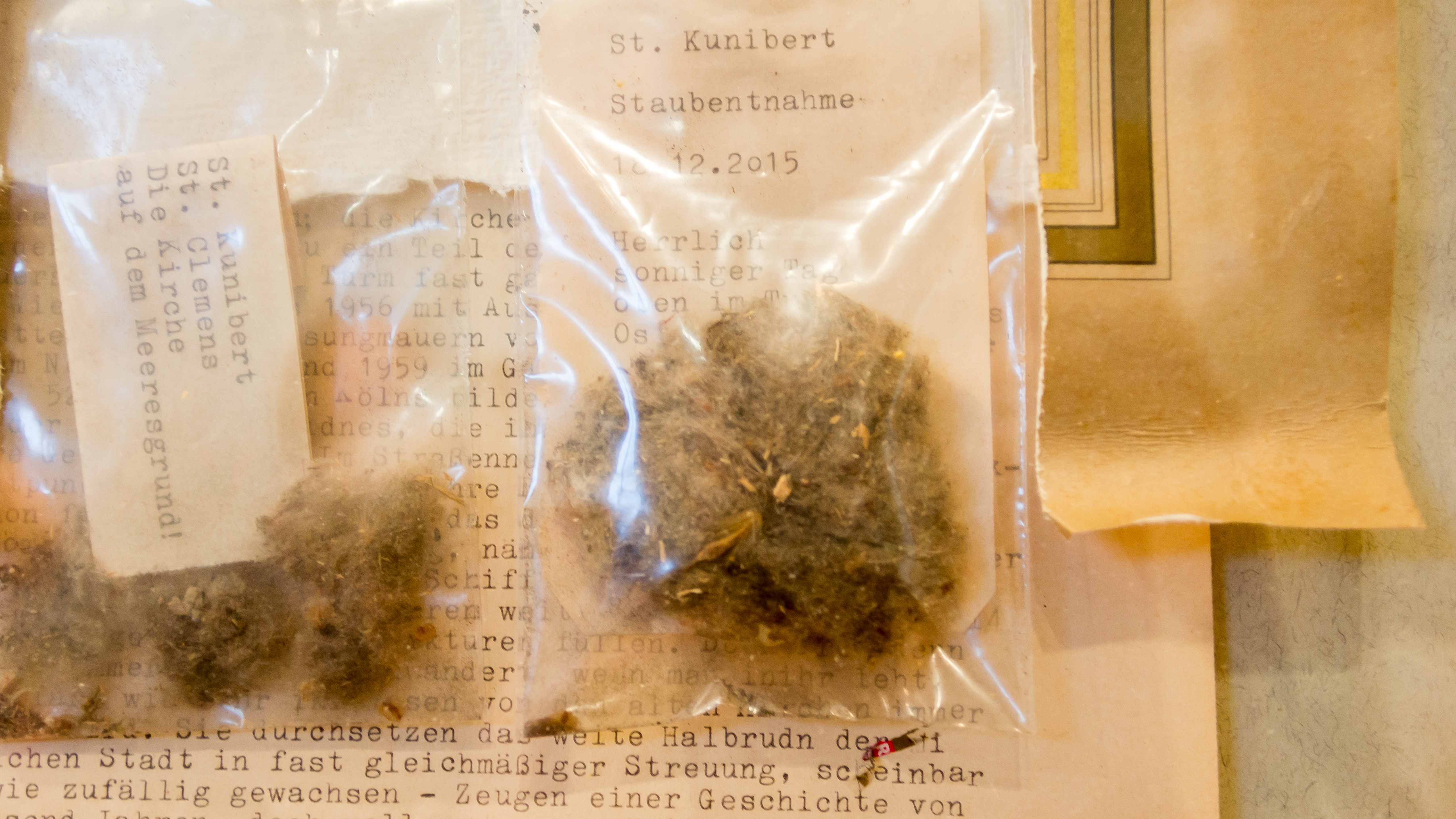 Ausstellung „Unter Kölner Dächern – Kölner Staub als Objektkunst und Fotografie“ im Goldenen Kubus des Kölnischen Stadtmuseums, 11. März bis 5. Juni 2016. Deutsches Staubarchiv, Wolfgang Stöcker